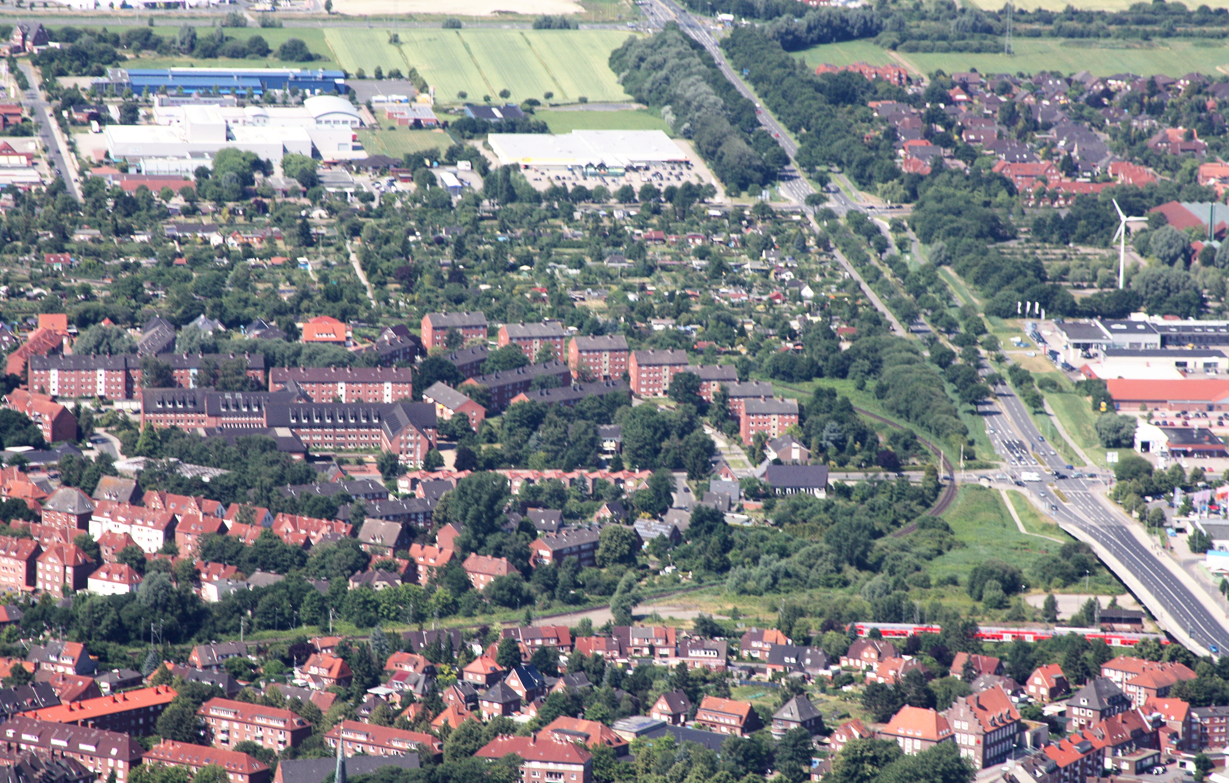 Flug über Emden; Flughöhe 1500 ft; Juli 2010; Originalfoto bearbeitet: Tonwertkorrektur und Bild geschärft mit Hochpassfilter